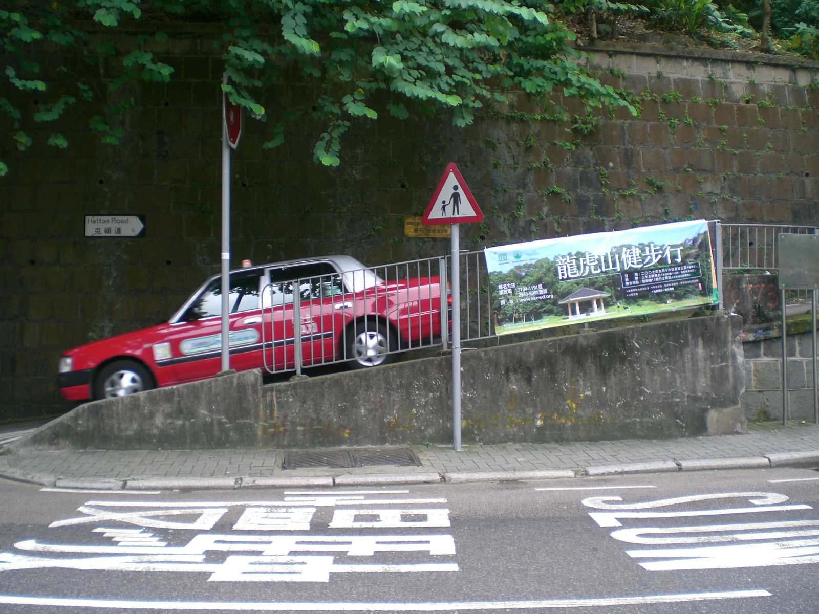 克頓道, Hatton Road, Hong Kong.